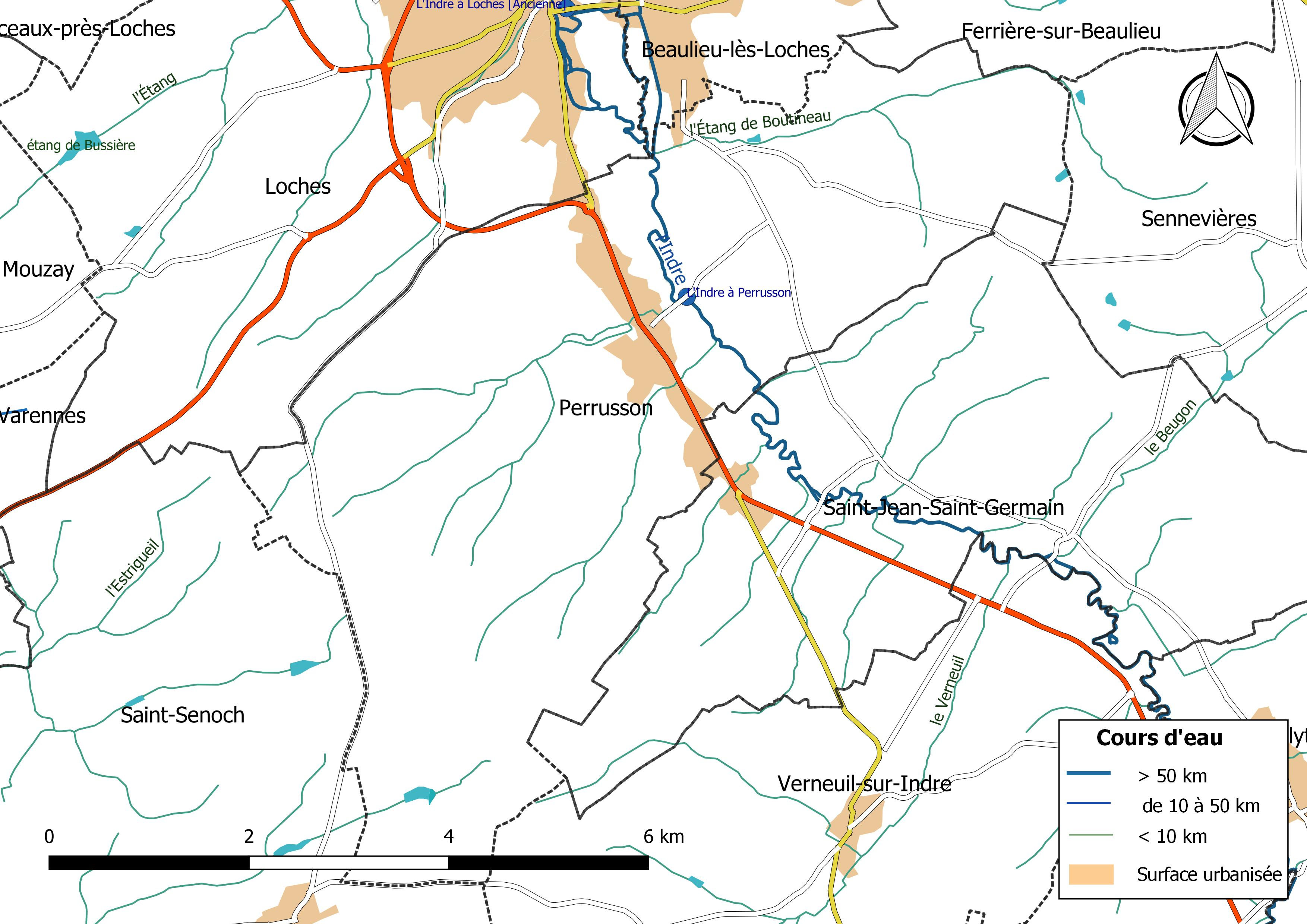 Carte du réseau hydrographique de la commune de Perrusson (France).